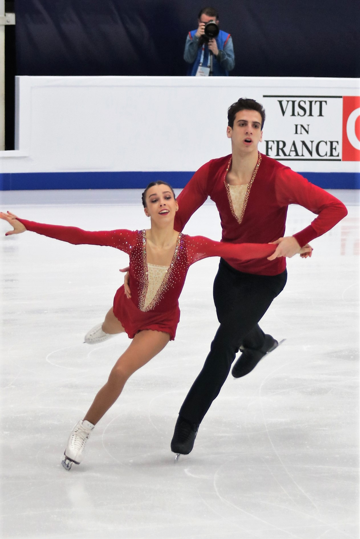 Laura Barquero и Aritz Maestu (Испания) на Чемпионате Европы по фигурному катанию 2018.